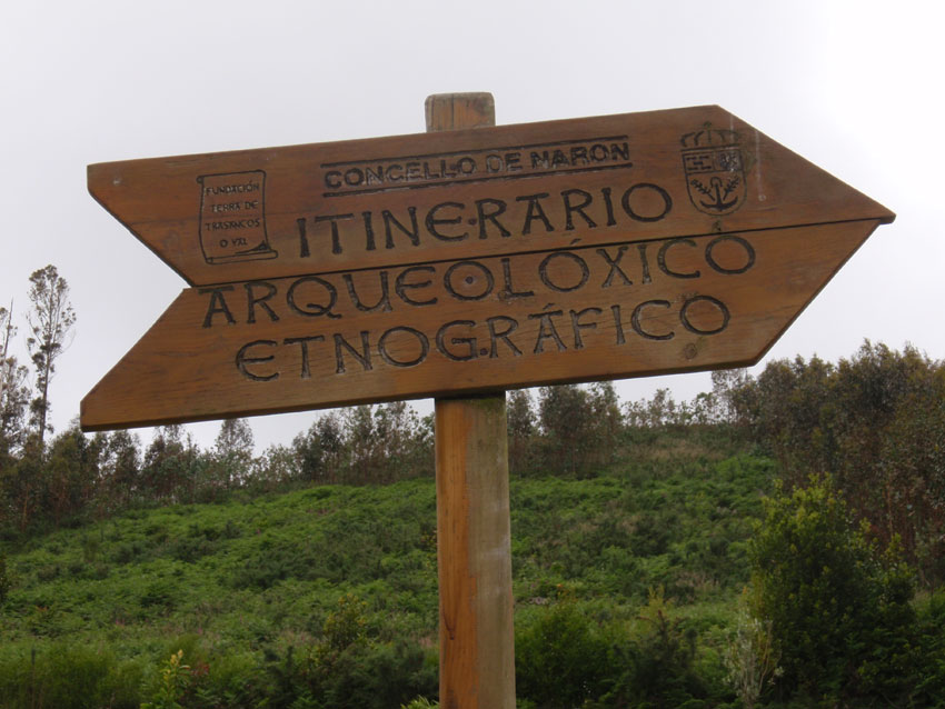 Foto das redondezas da Pena Molexa (Narón, Galiza)